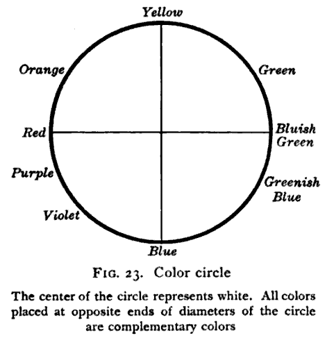 An opponent color circle